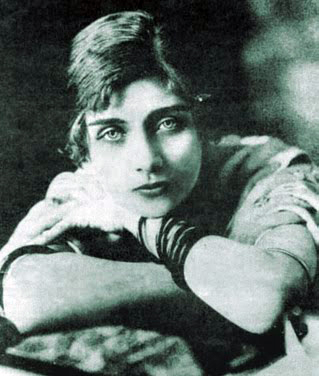 María Teresa de las Mercedes Wilms Montt, Escritora chilena de principios del siglo XX. nació en Viña del Mar, Chile el año 1893 se suicida en París en 1921. Feminista y anarquista.